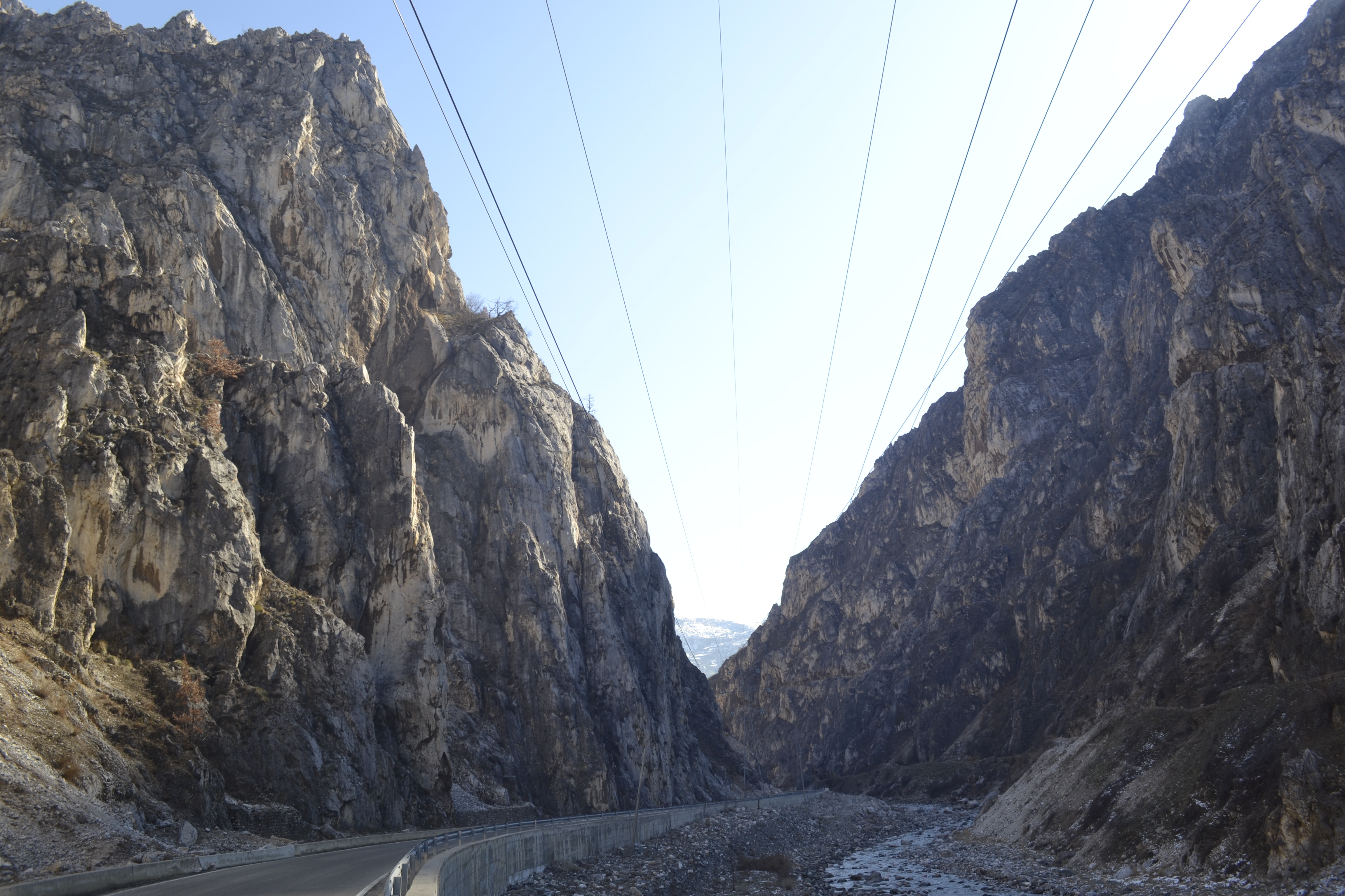 Gryka e Vanajve.